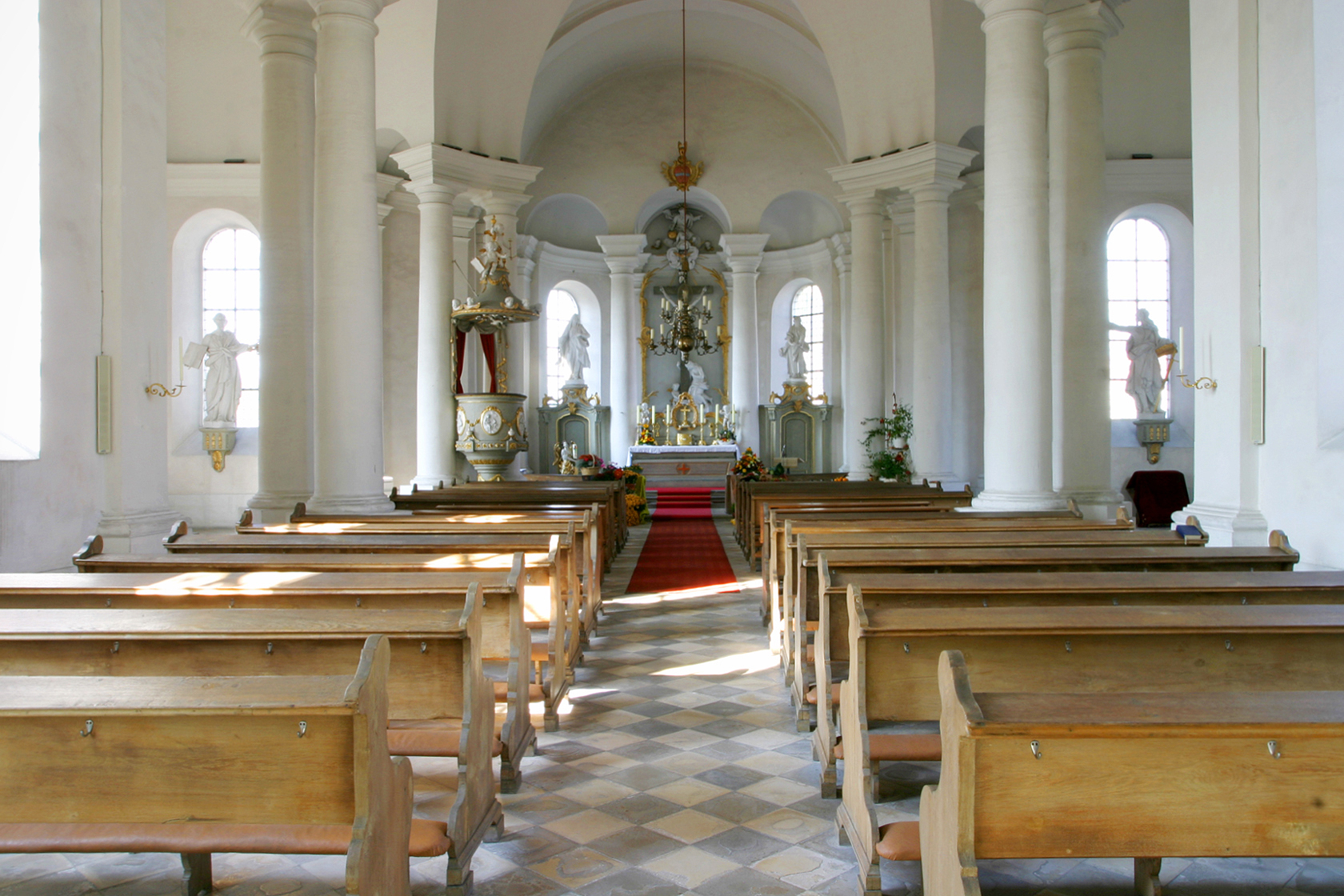 Kreuzkapelle Kitzingen-Etwashausen, Innenraum